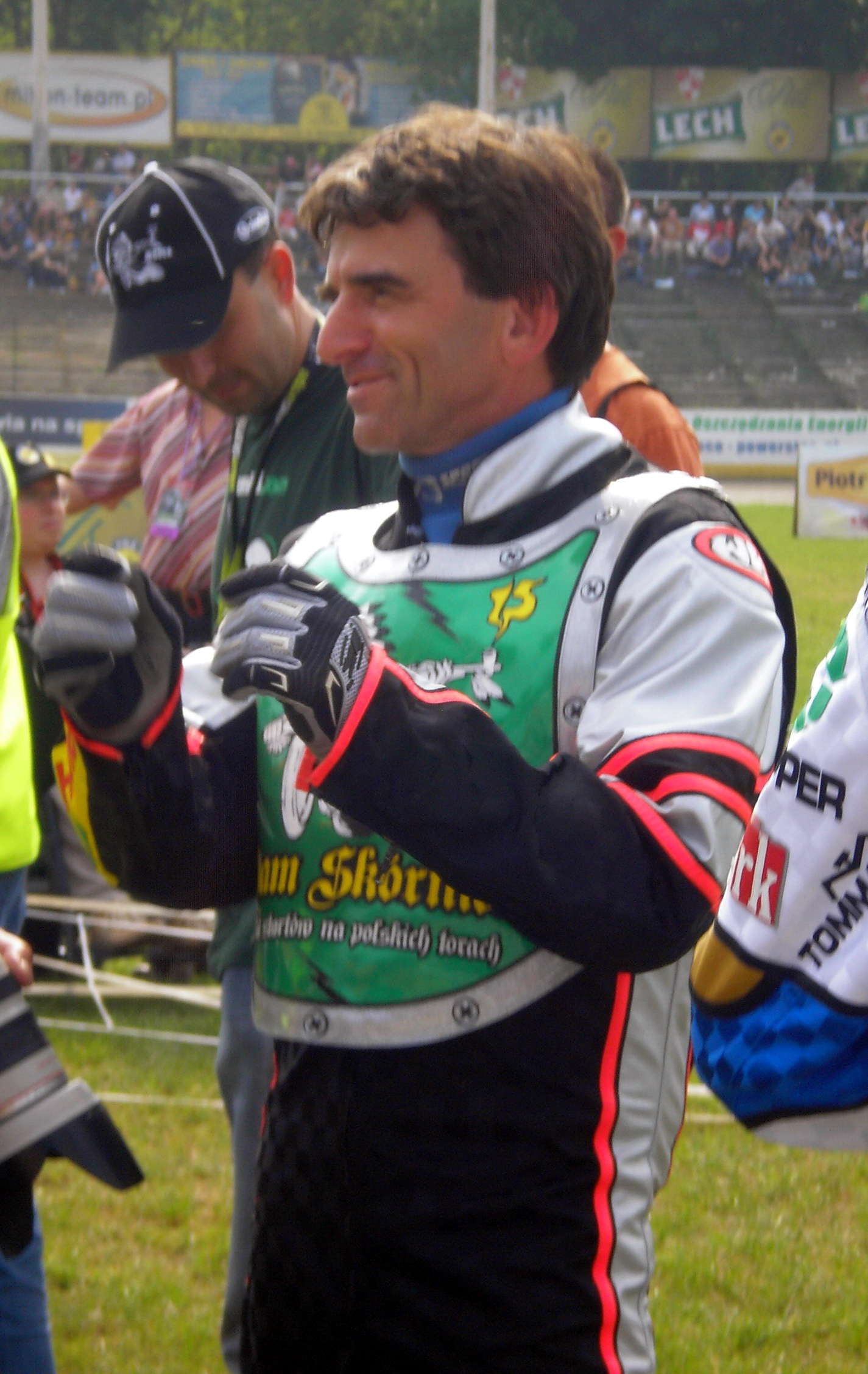 Roman Jankowski w Poznaniu - Turniej z okazji 15-lecia startów Adama Skórnickiego